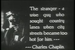 Placa de la película de Charles Chaplin Mabel´s Punctured Romance